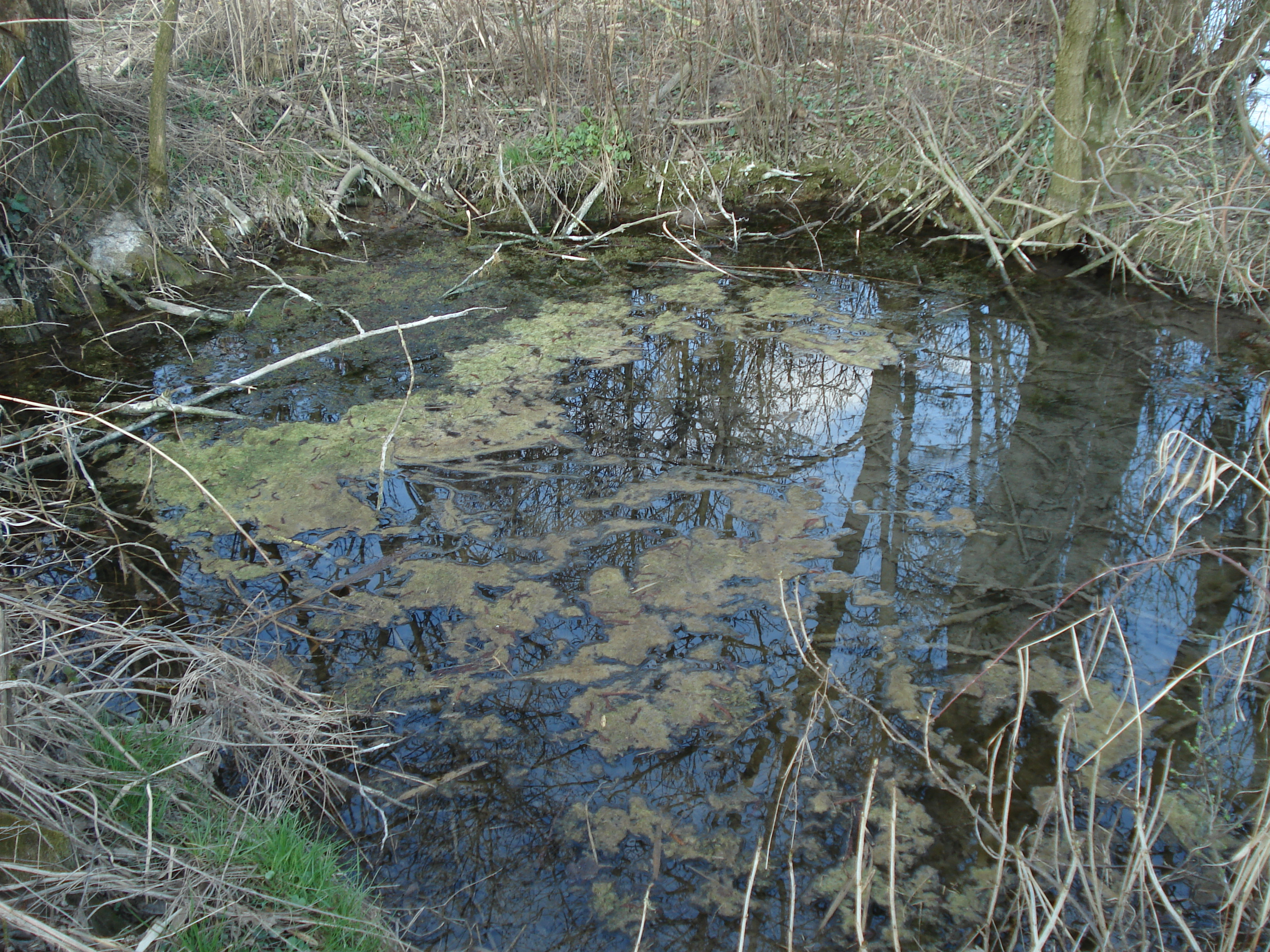 Karstquelle Grundlos